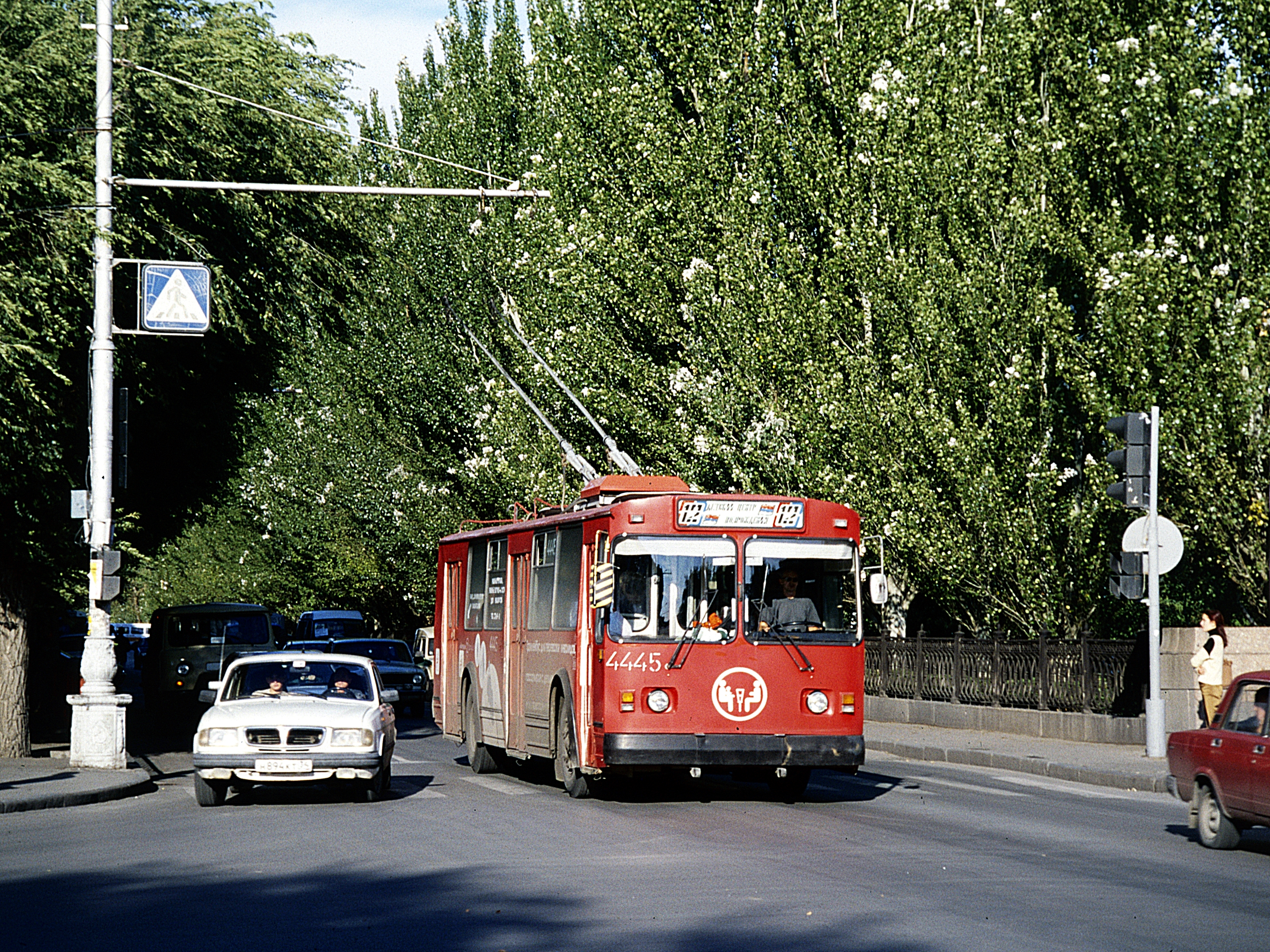 O-Bus-Linie 12 im Stadtzentrum von Wolgograd